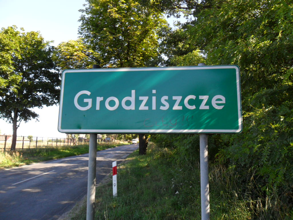 Grodziszcze